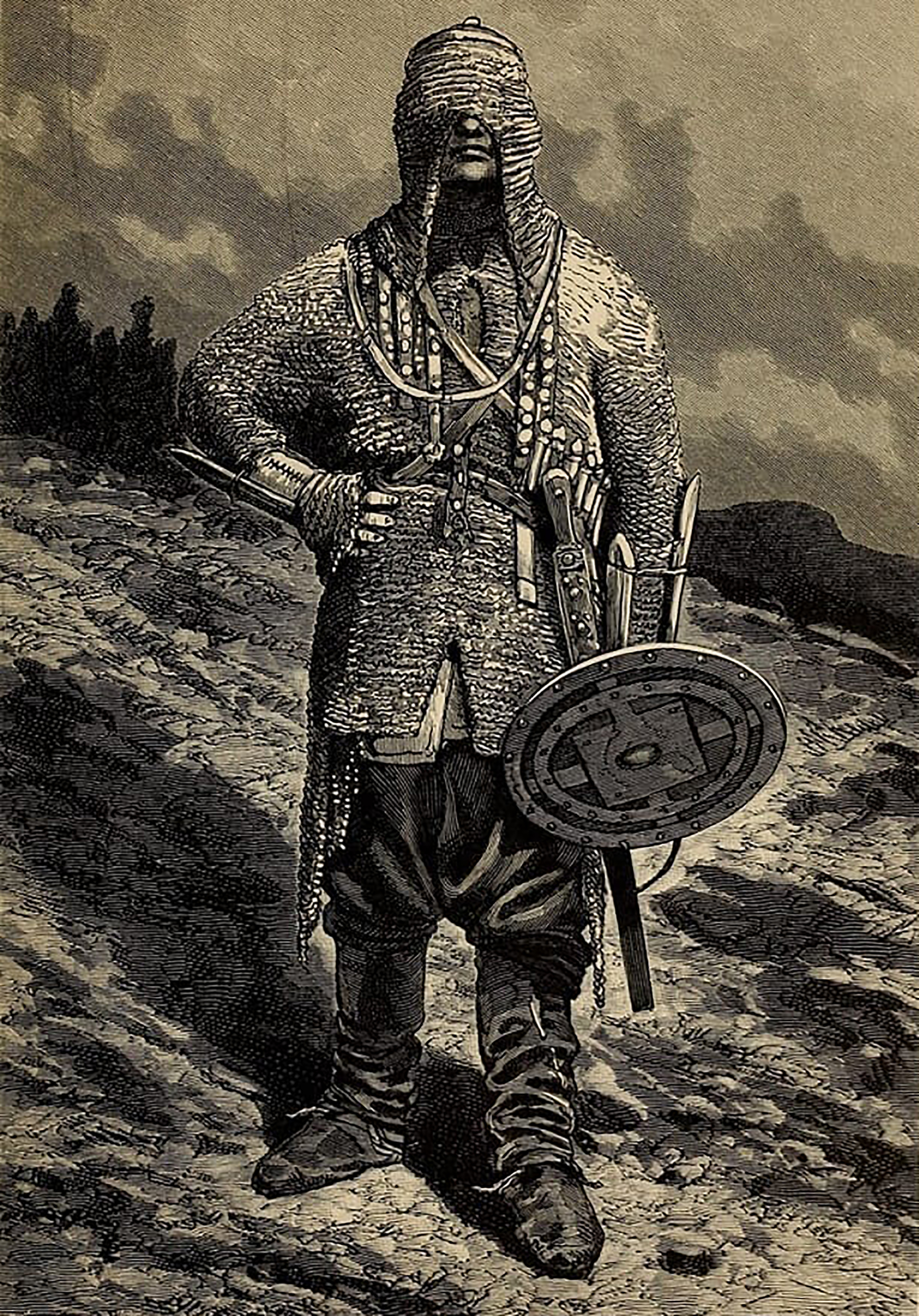 Tschetschenze – Reise auf dem Kaspischen Meere und in den Kaukasus. Band 2 Unternommen in den Jahren 1825 — 1826